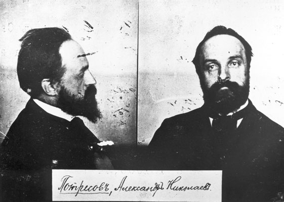 Александр Николаевич Потресов, полицейское фото. фото из архива департамента полиции